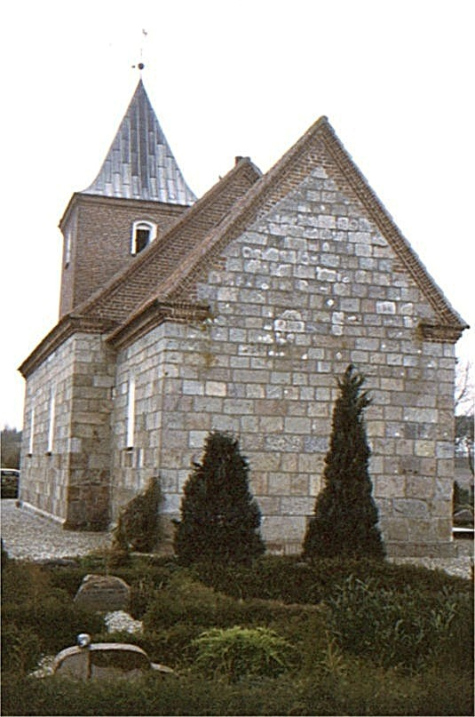 Svostrup Kirke, set fra øst